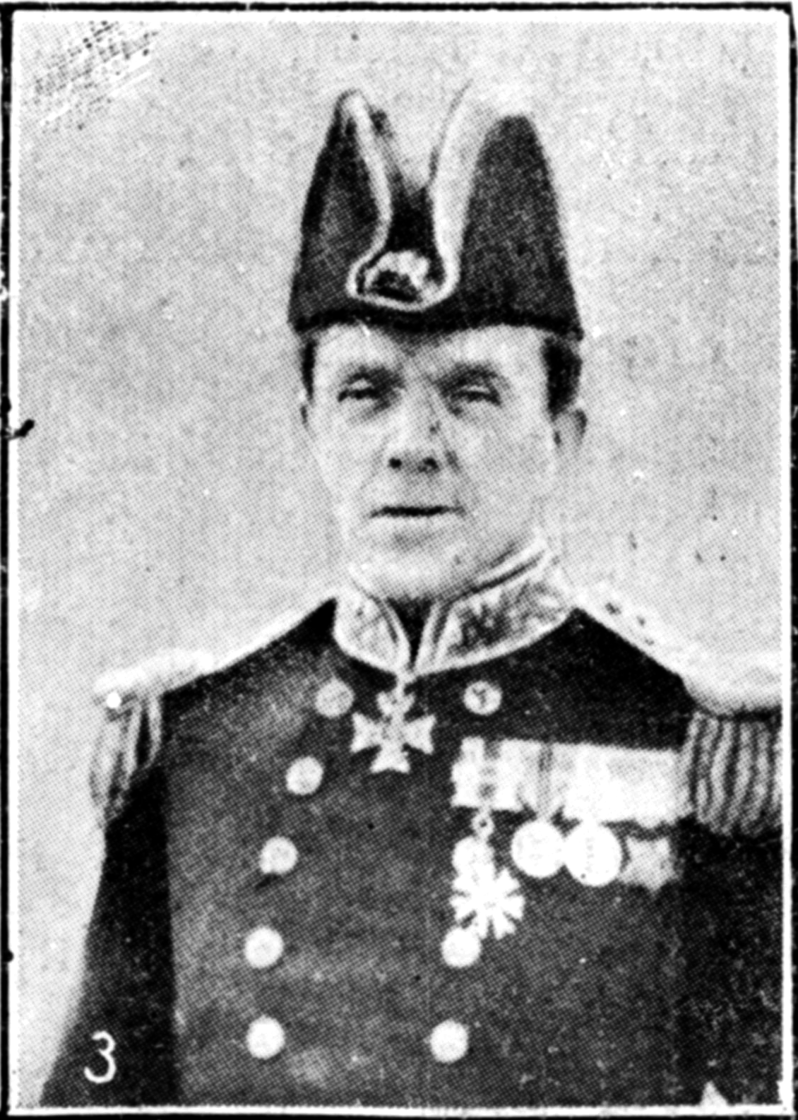 Amirarul Sturdee